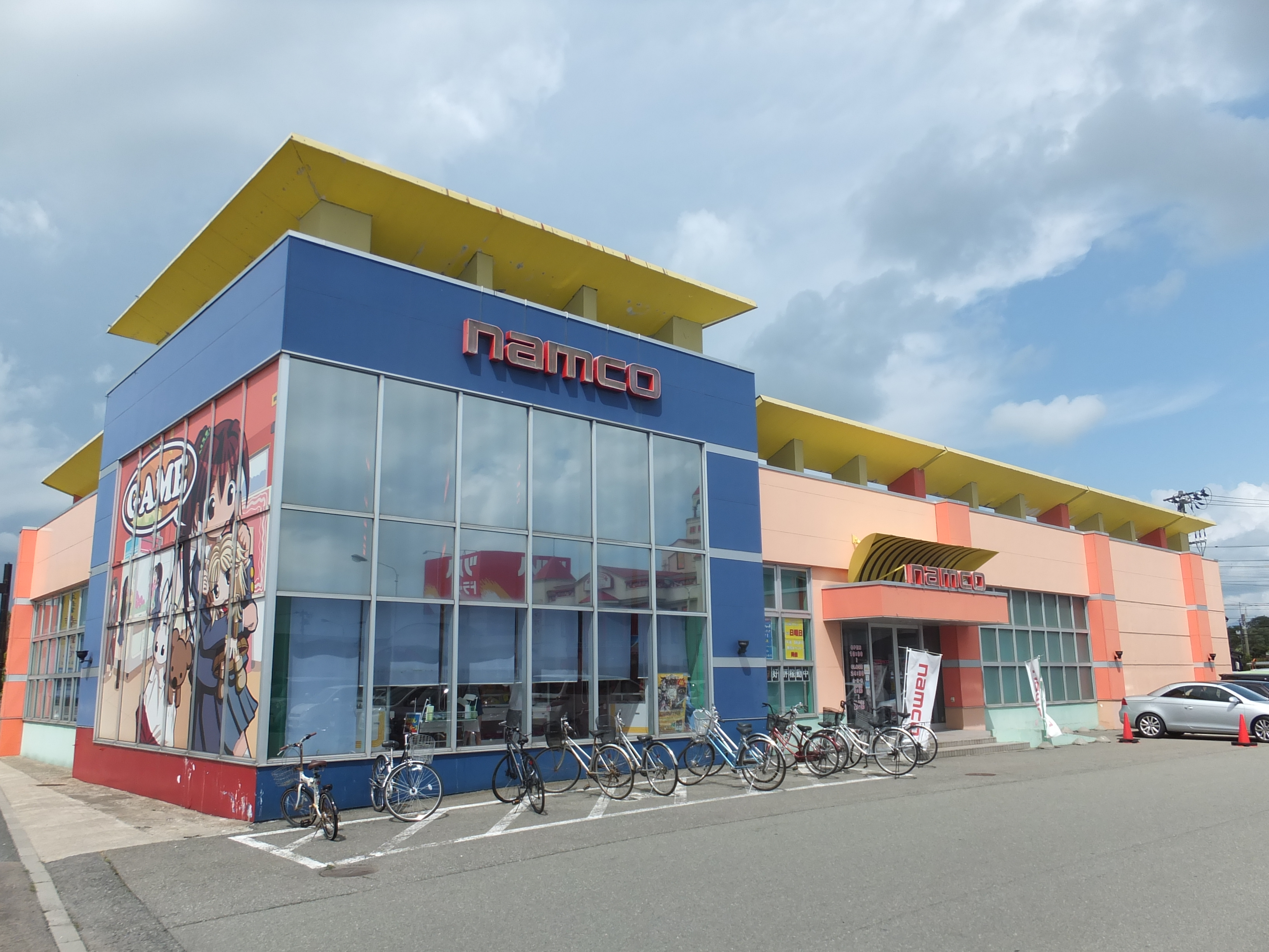 ナムコのゲームセンター・プラボ秋田店 （秋田市土崎港北）。国道7号に面した壁面には地元出身のイラストレーター・こばやしたけし氏によるイラストが描かれている。